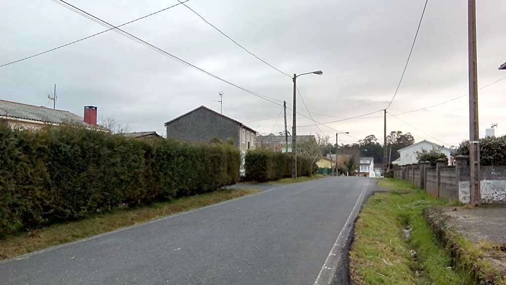 Vista dos Bidueiros, Doso, Narón.